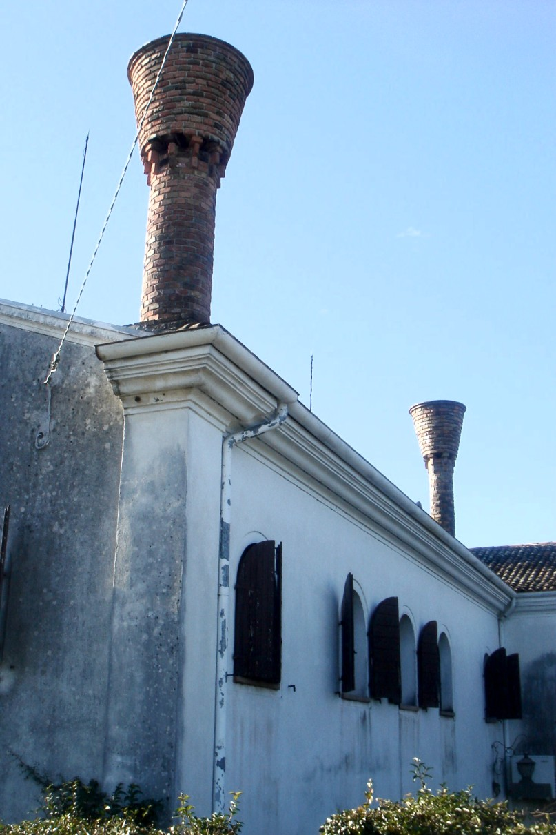 Collalbrigo di Conegliano (Treviso): Villa Cosulich, coi tipici comignoli (XIX secolo).